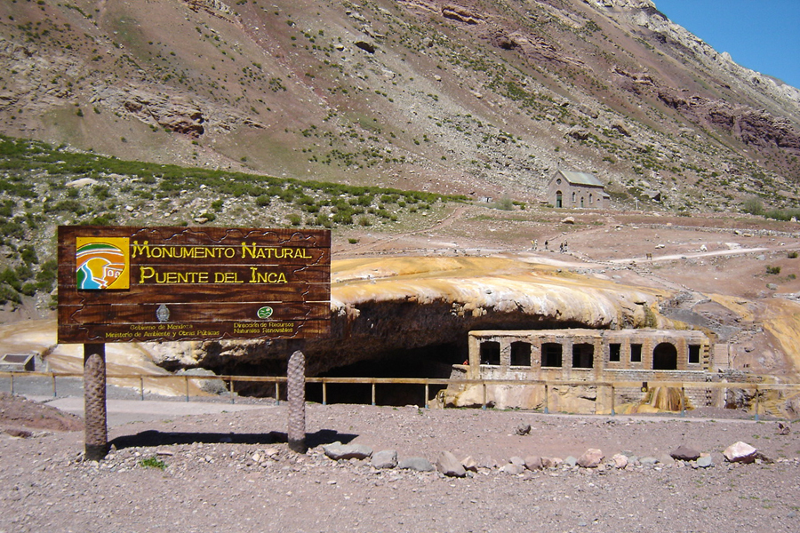 Natural Monument Inca's Bridge (Puente del Inca), Mendoza, ARG